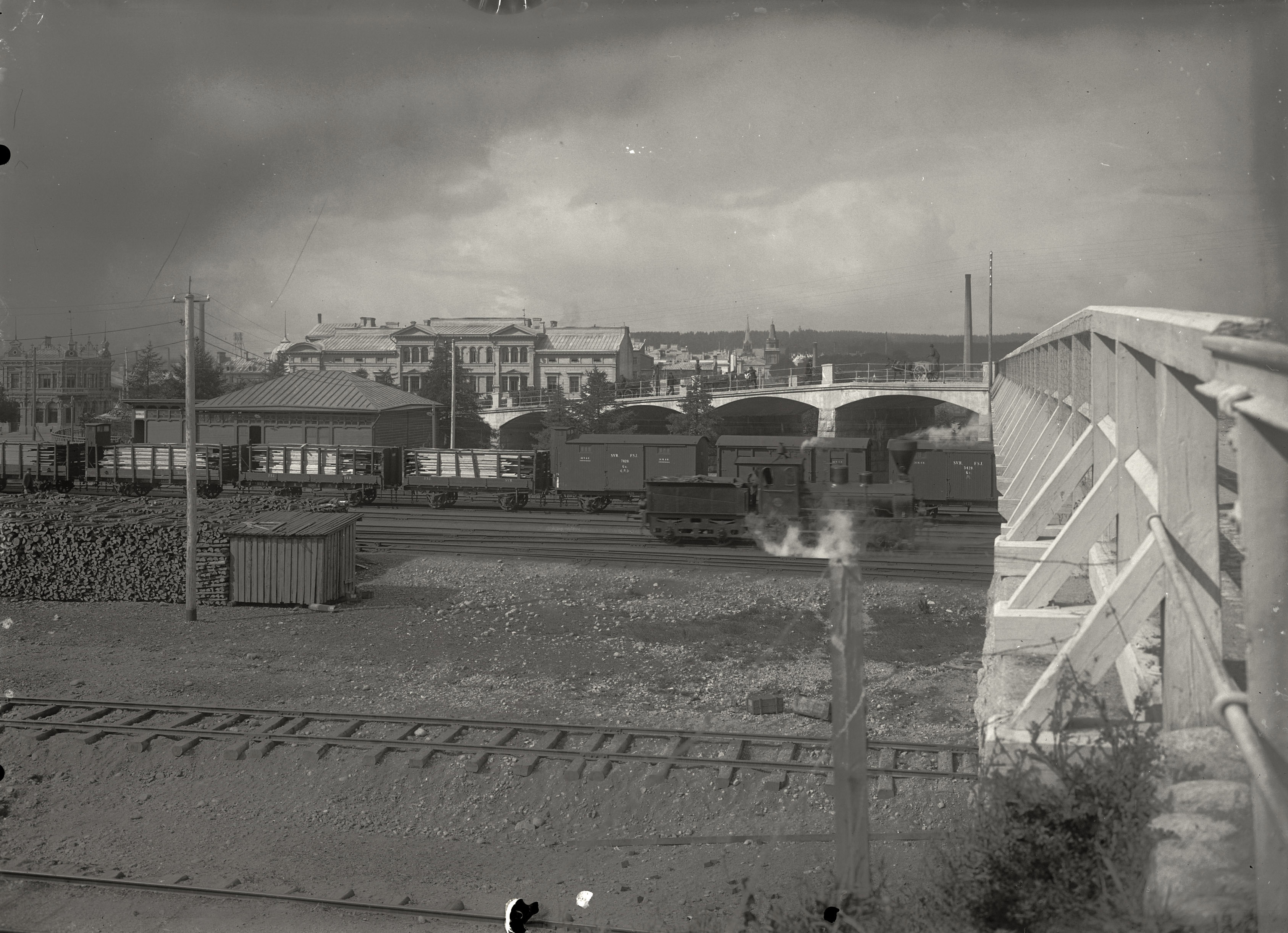 Tammerfors - Tampere ca 1900-1910. By Alex Federley (1864-1932). Åbo Akademi Picture collections - Åbo Akademis Bildsamlingar - Åbo Akademin kuvakokoelmat 1959/400:110. Do you know anything about this picture? Leave a comment below, or .